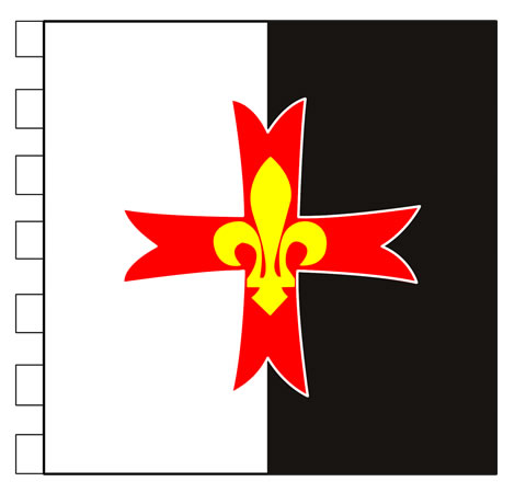 Estandarte de la Unión Internacional de Guías y Scouts de Europa